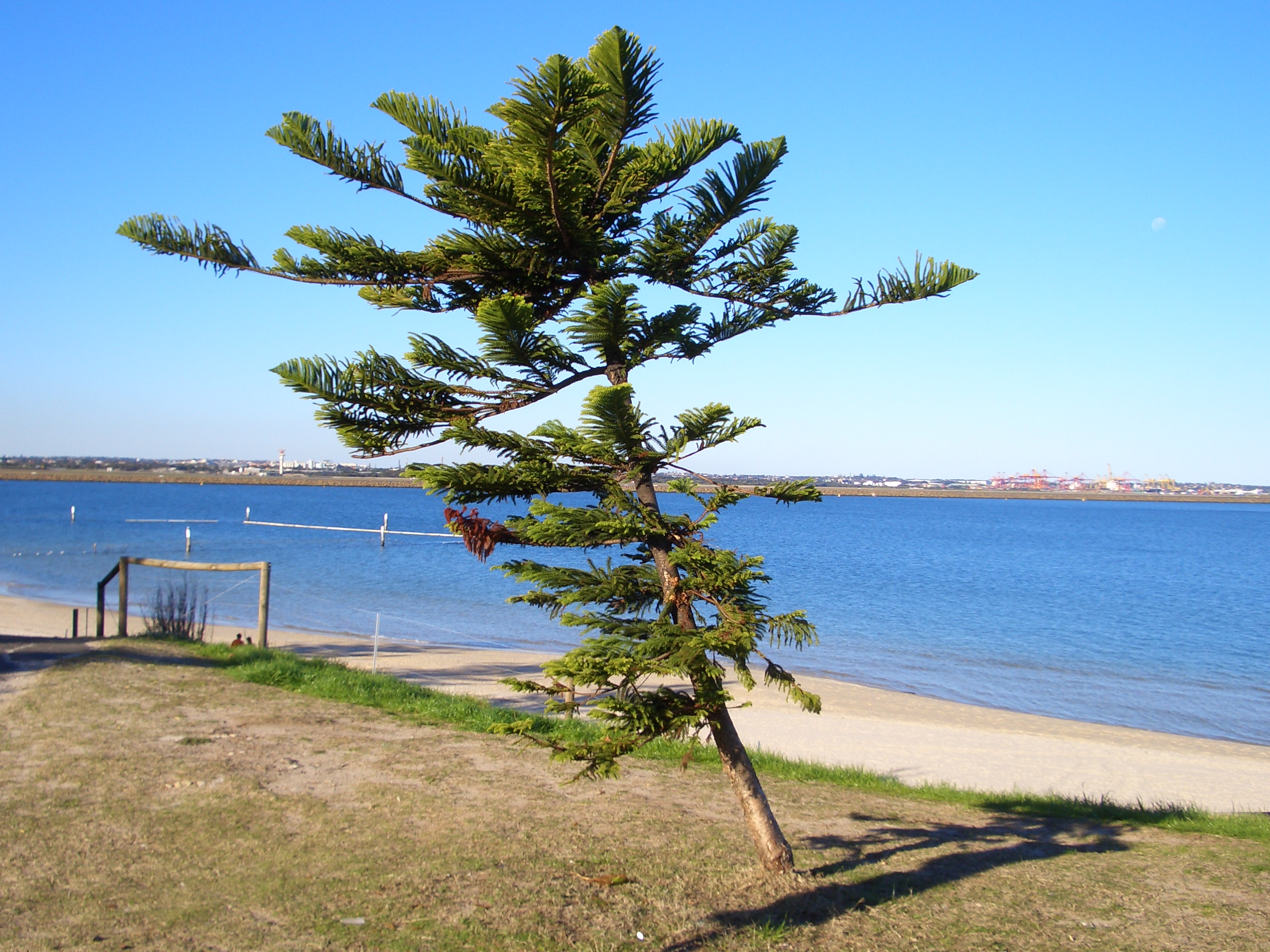 Kyeemagh, Sydney